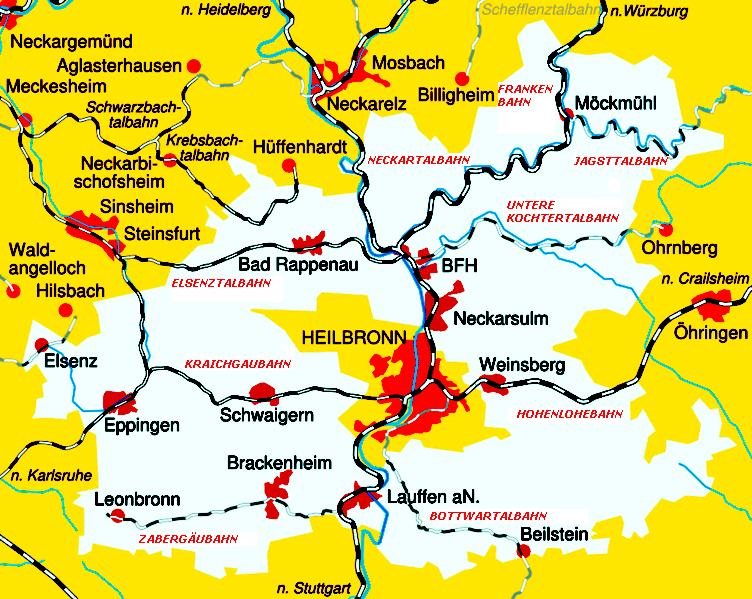 Bahnstreckennetz LK Heilbronn